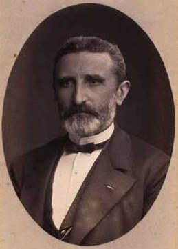 Carl Ludvig Møller (1815-1886), Danish merchant, MP